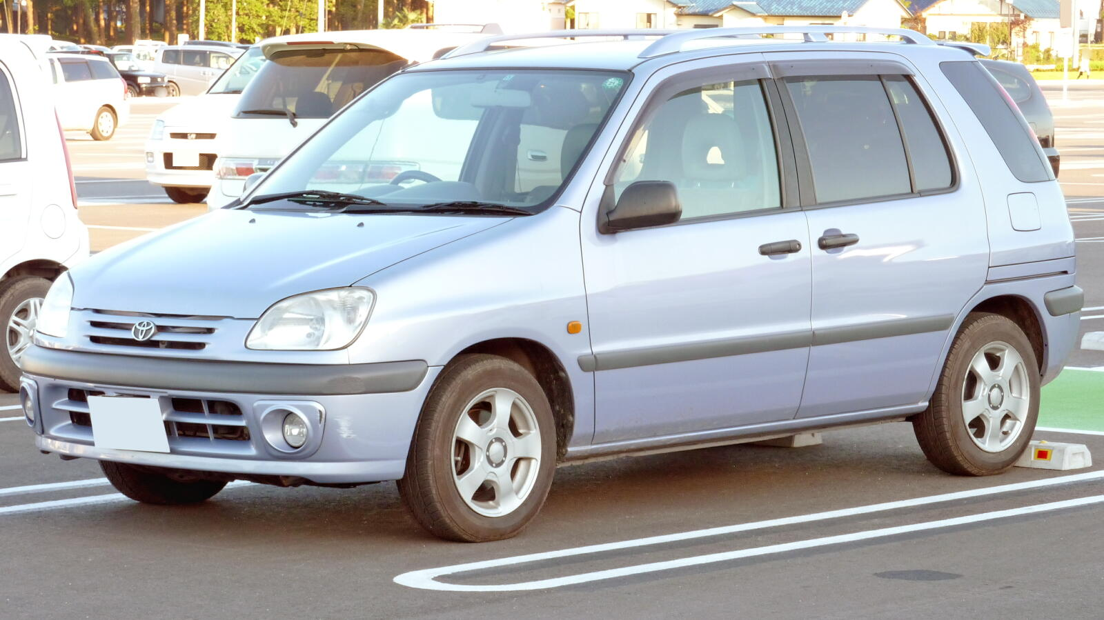 トヨタ・ラウム（初代）